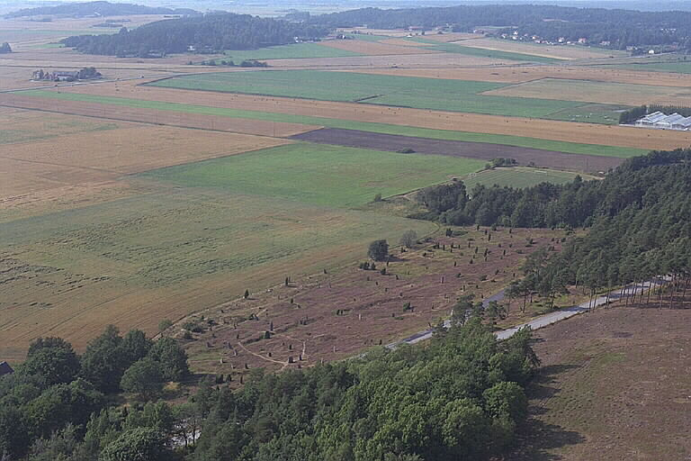 Gravfält i bildens nedre del. Motiv: Fjärås Bräcka Nyckelord: Flygbilder, Naturreservat, Riksintressen Kategori: Slättbygd, Gravfält Gravfält i bildens nedre del.